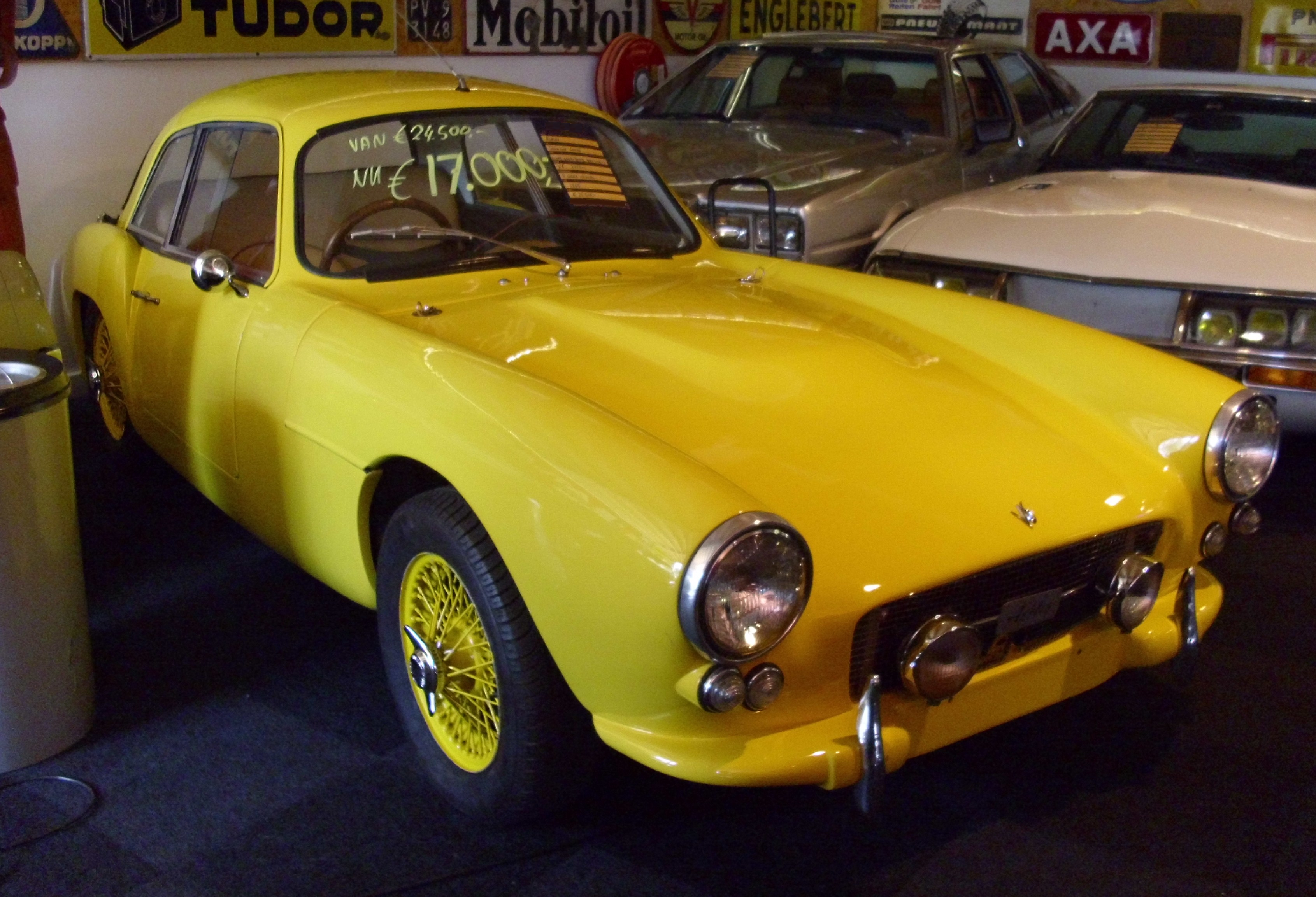 Ashley Sportiva Coupé 1960-1962